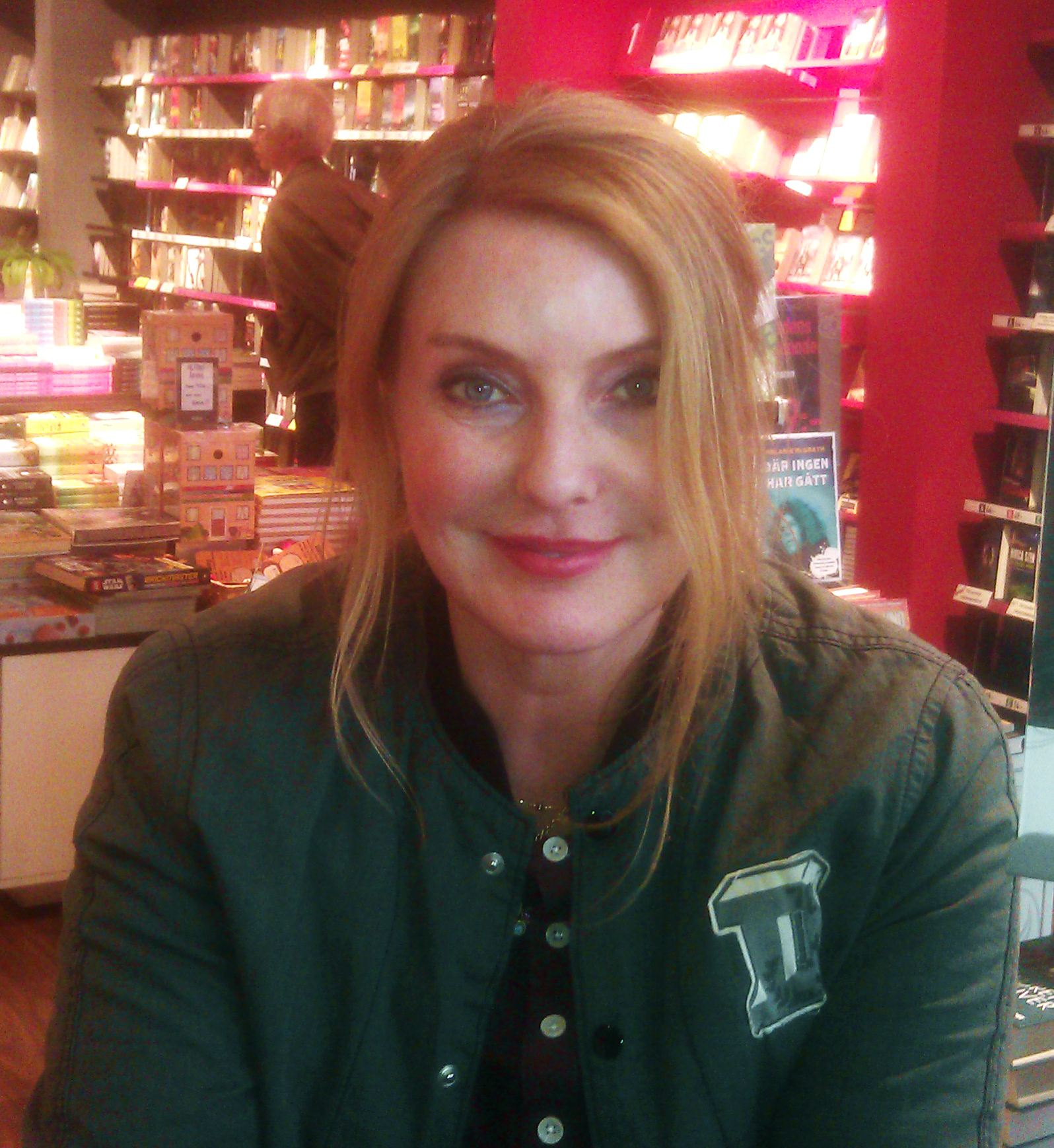 Beskuren och bearbetad bild på Cecilia Gyllenhammar.